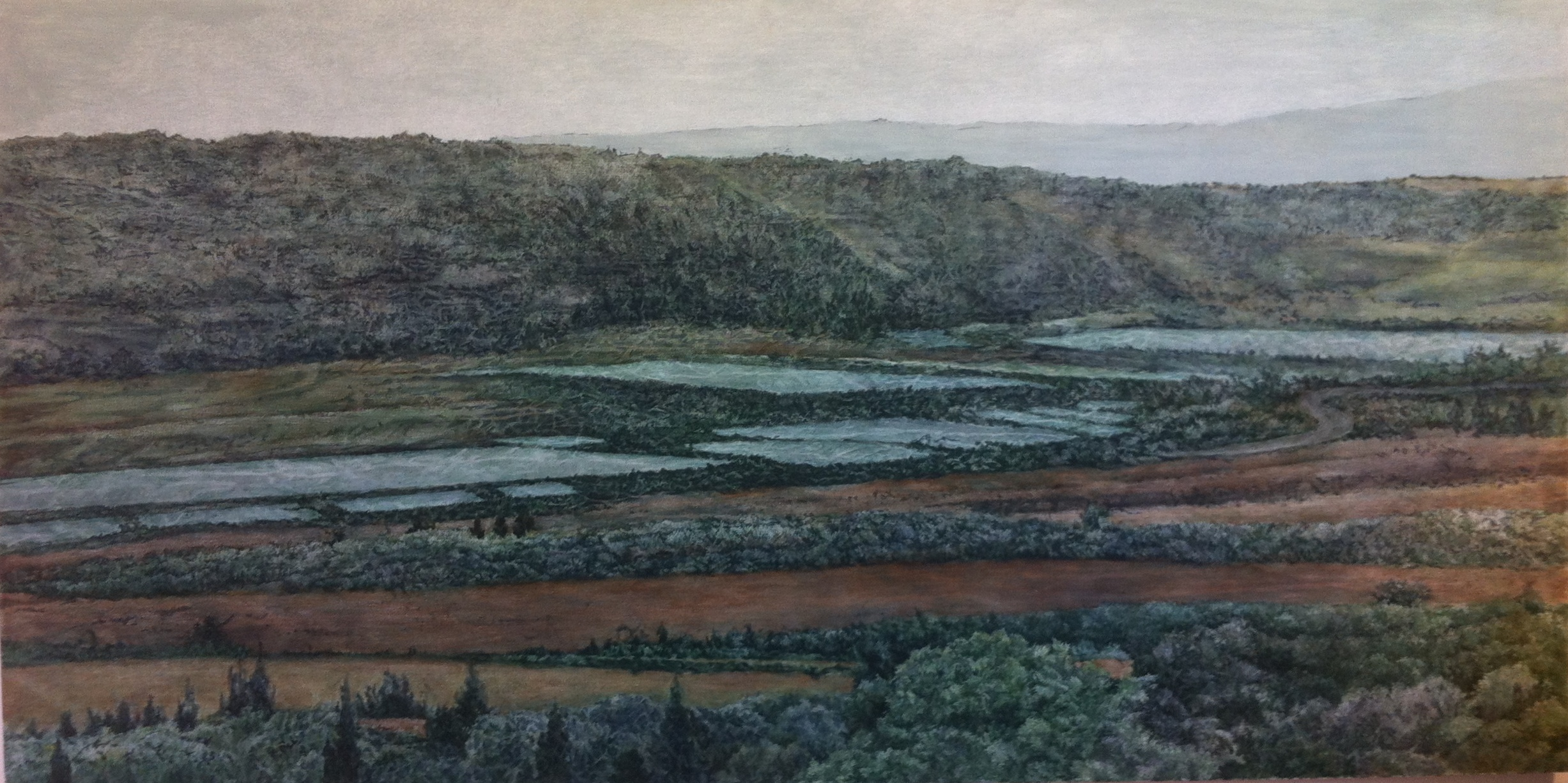 אחד מסדרת הציורים של בתי העלמין בעמק יזרעאל שציירה הדר גד